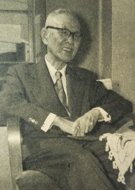 神戸正雄